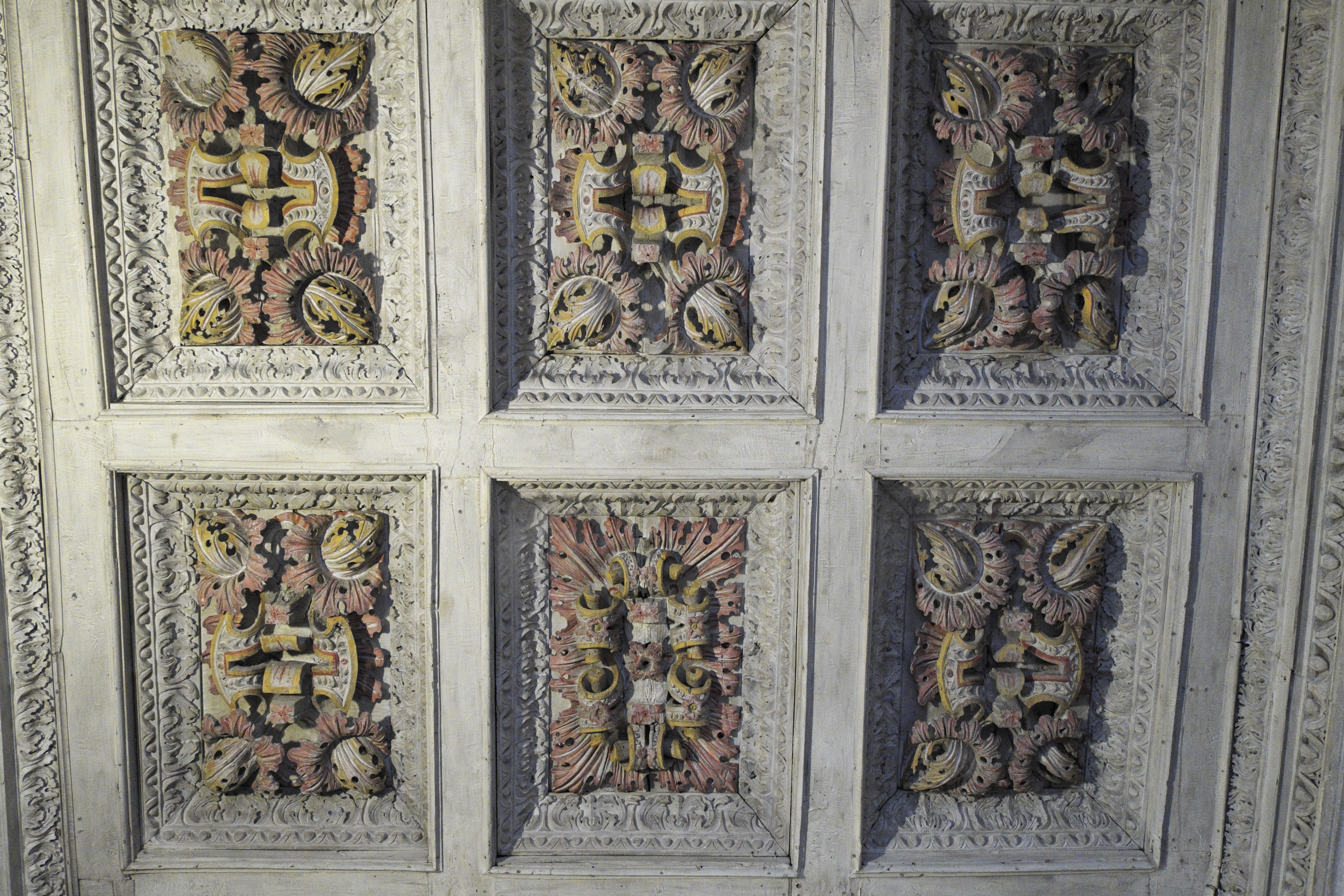 Klosterkirche São Gonçalo in Amarante im Distrikt Porto (Nordportugal), Kassettendecke über dem Durchgang zwischen Kirche und Kreuzgang